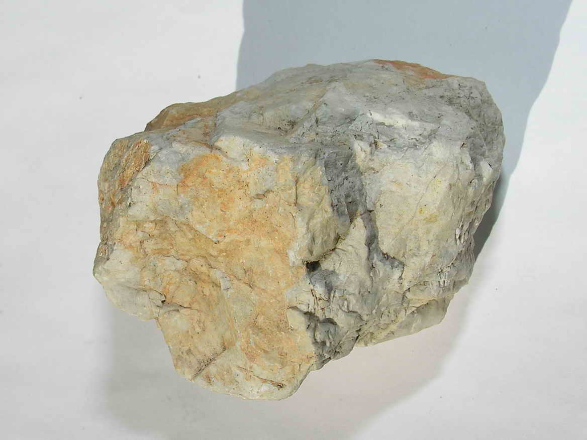 ambiglonita, ambiglonita